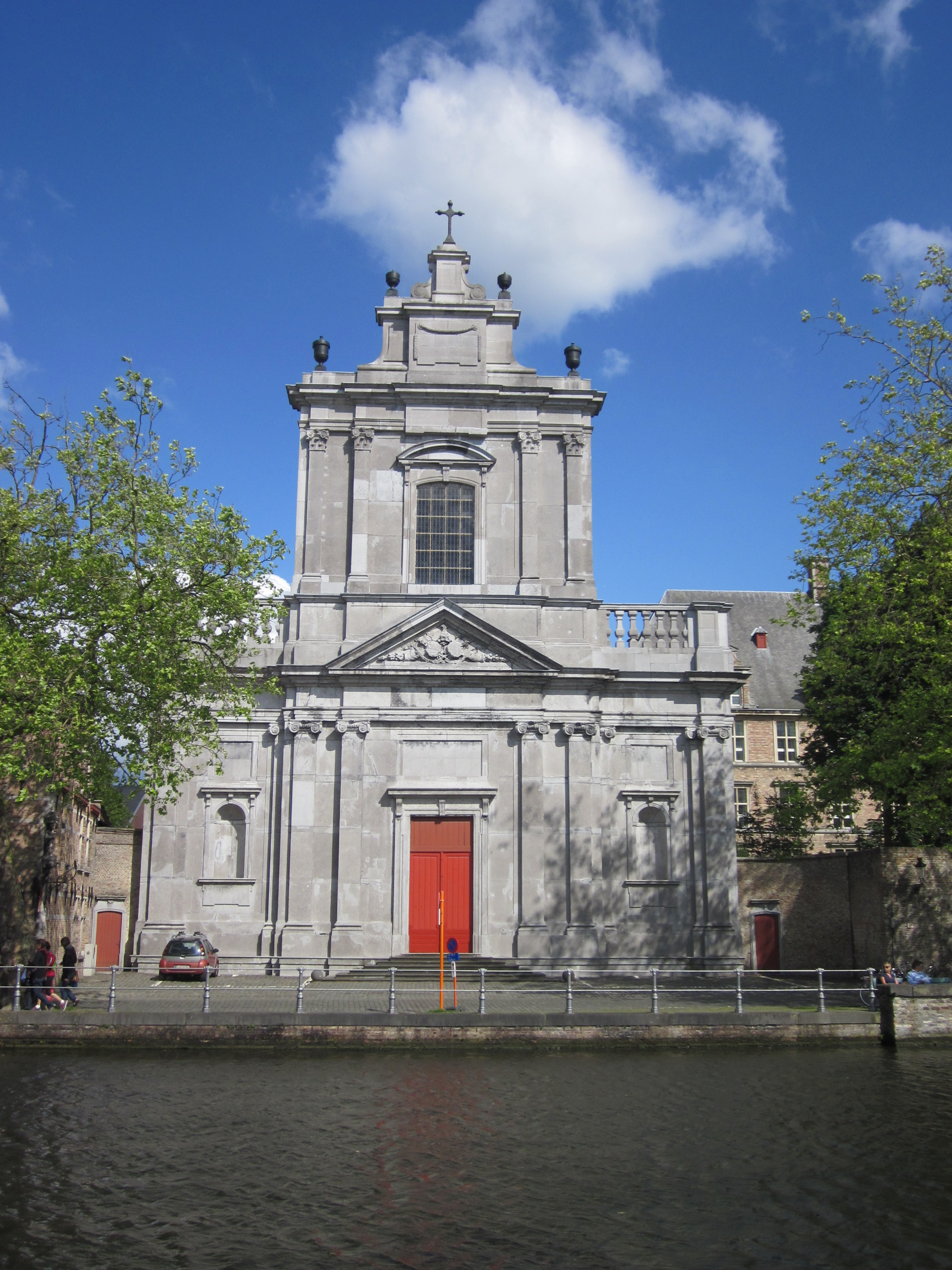 Heilige-Maagd-Mariakerk (Grootseminarie) Brugge 14″ N, 3° 13′ 56.21″ E